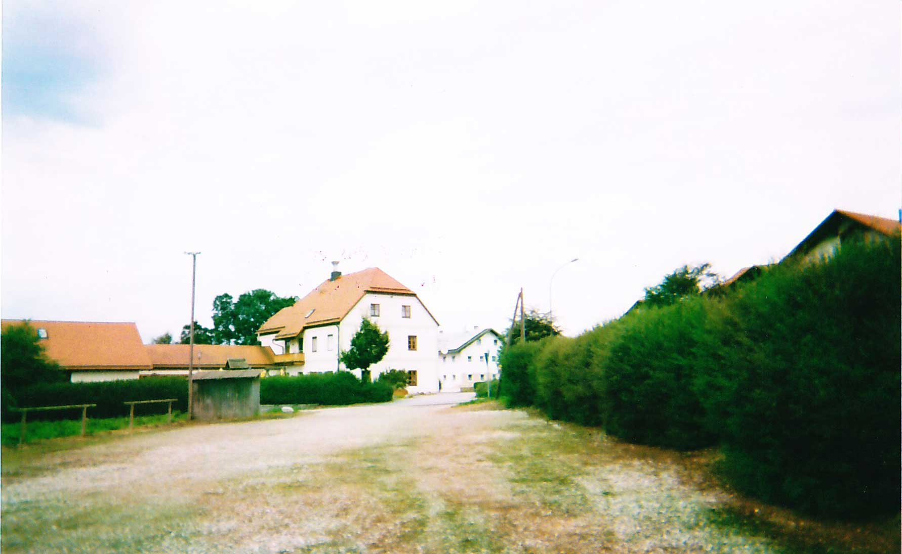 Der Edelsitz Permering im obersten Tal der Große Vils